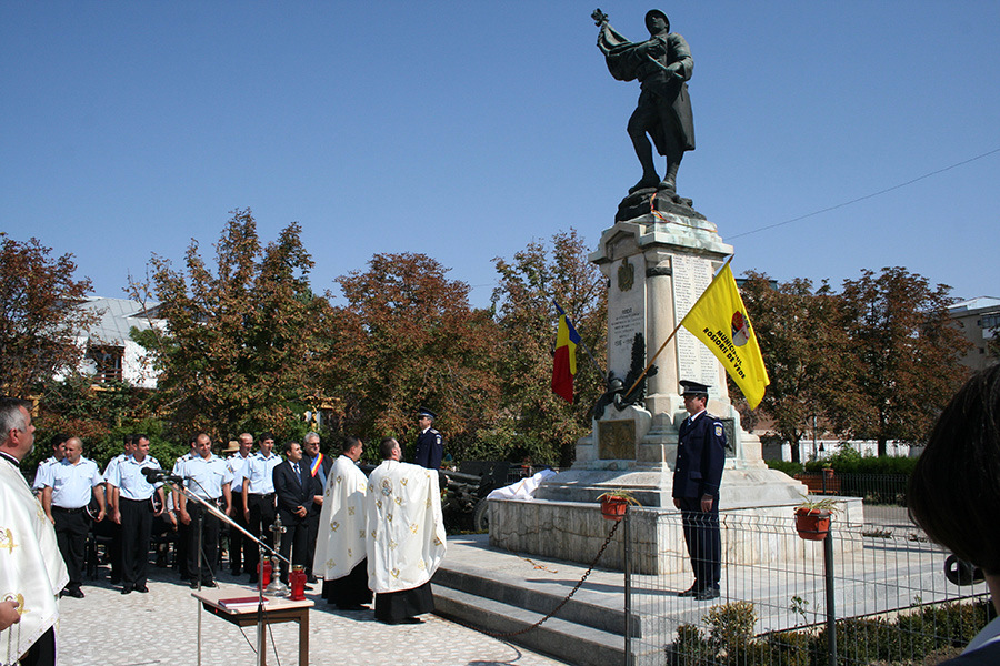 Monumentul din Roșiorii de Vede ridicat în cinstea eroilor morţi în Războiul pentru întregirea neamului din 1916-1919